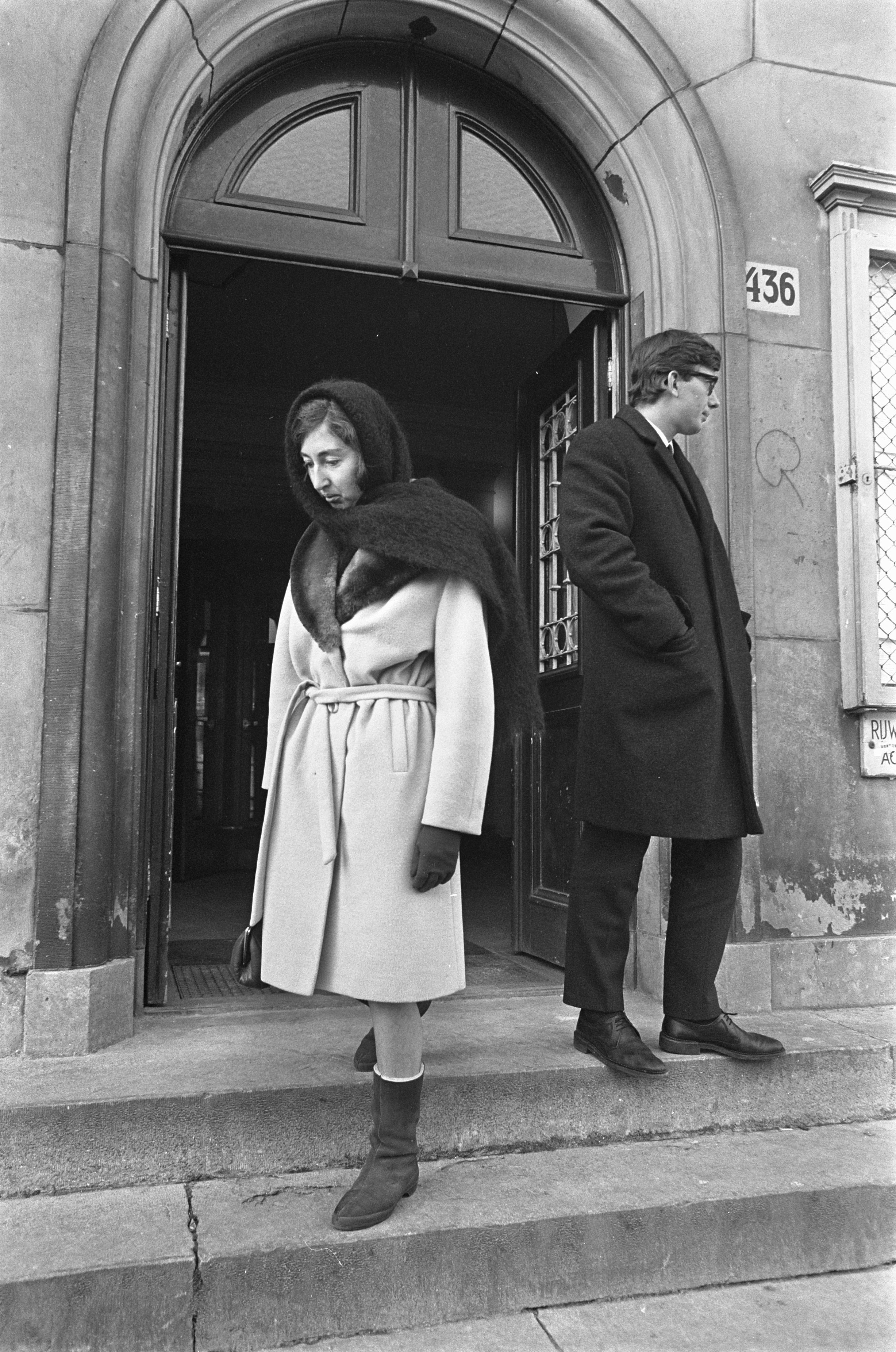 Collectie / Archief : Fotocollectie Anefo Reportage / Serie : [ onbekend ] Beschrijving : Opdracht Elsevier, gescheiden paar verlaat gerechtsgebouw Datum : 12 februari 1968 Trefwoorden : gerechtsgebouwen Instellingsnaam : Elsevier Fotograaf : Nijs, Jac. de / Anefo Auteursrechthebbende : Nationaal Archief Materiaalsoort : Negatief (zwart/wit) Nummer archiefinventaris : bekijk toegang 2.24.01.05 Bestanddeelnummer : 921-0704